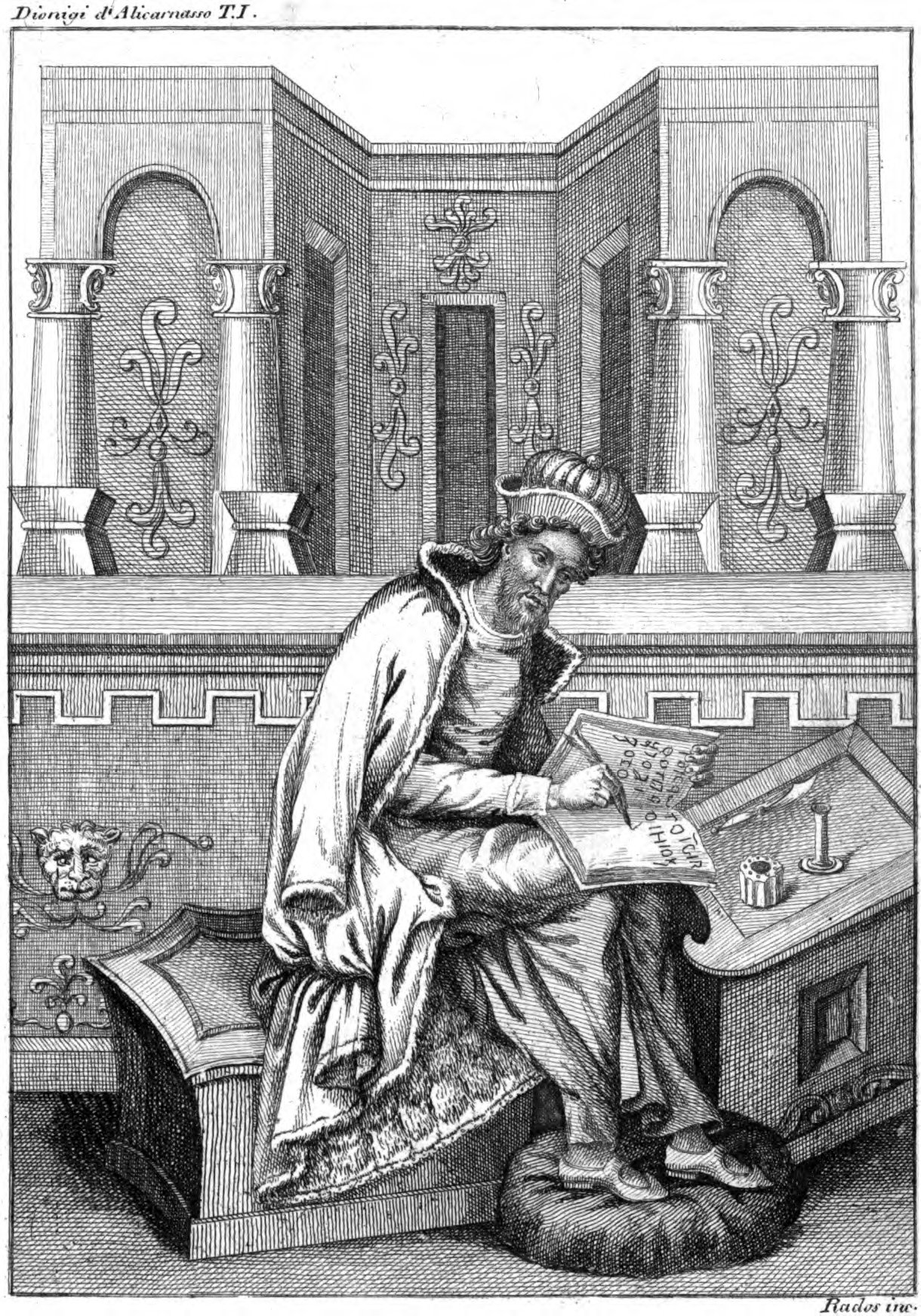 Incisione raffigurante Dionigi di Alicarnasso ricavata dal Codice Ambrosiano